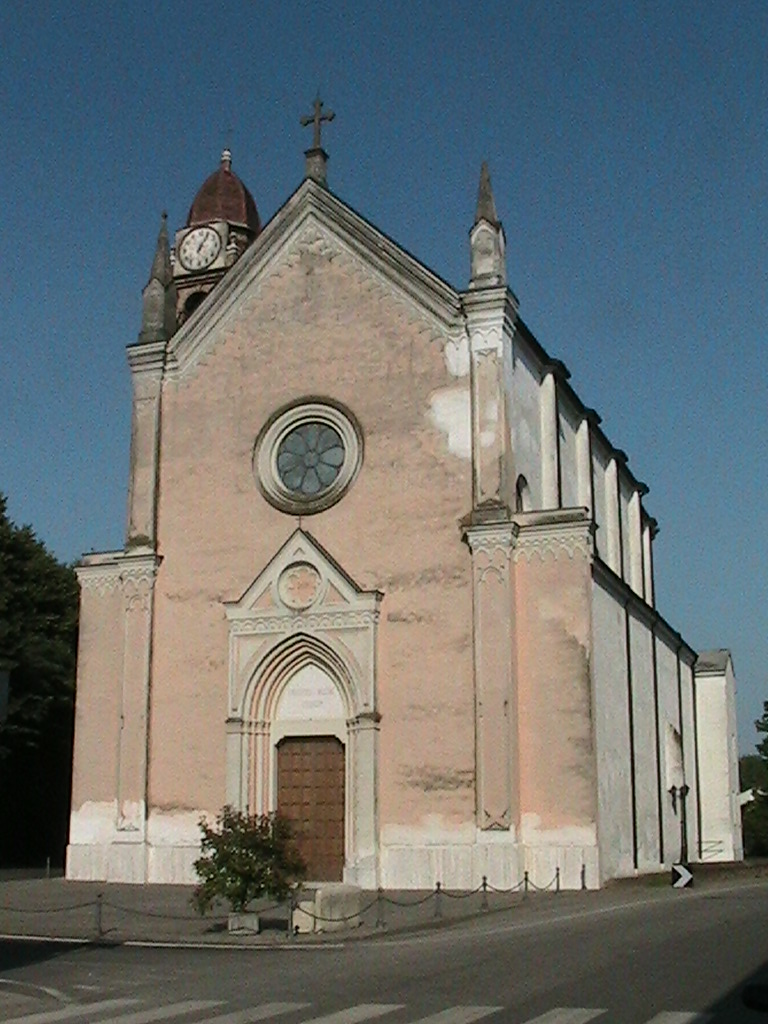 Scandolara Ripa d'Oglio - Chiesa parrocchiale di San Michele